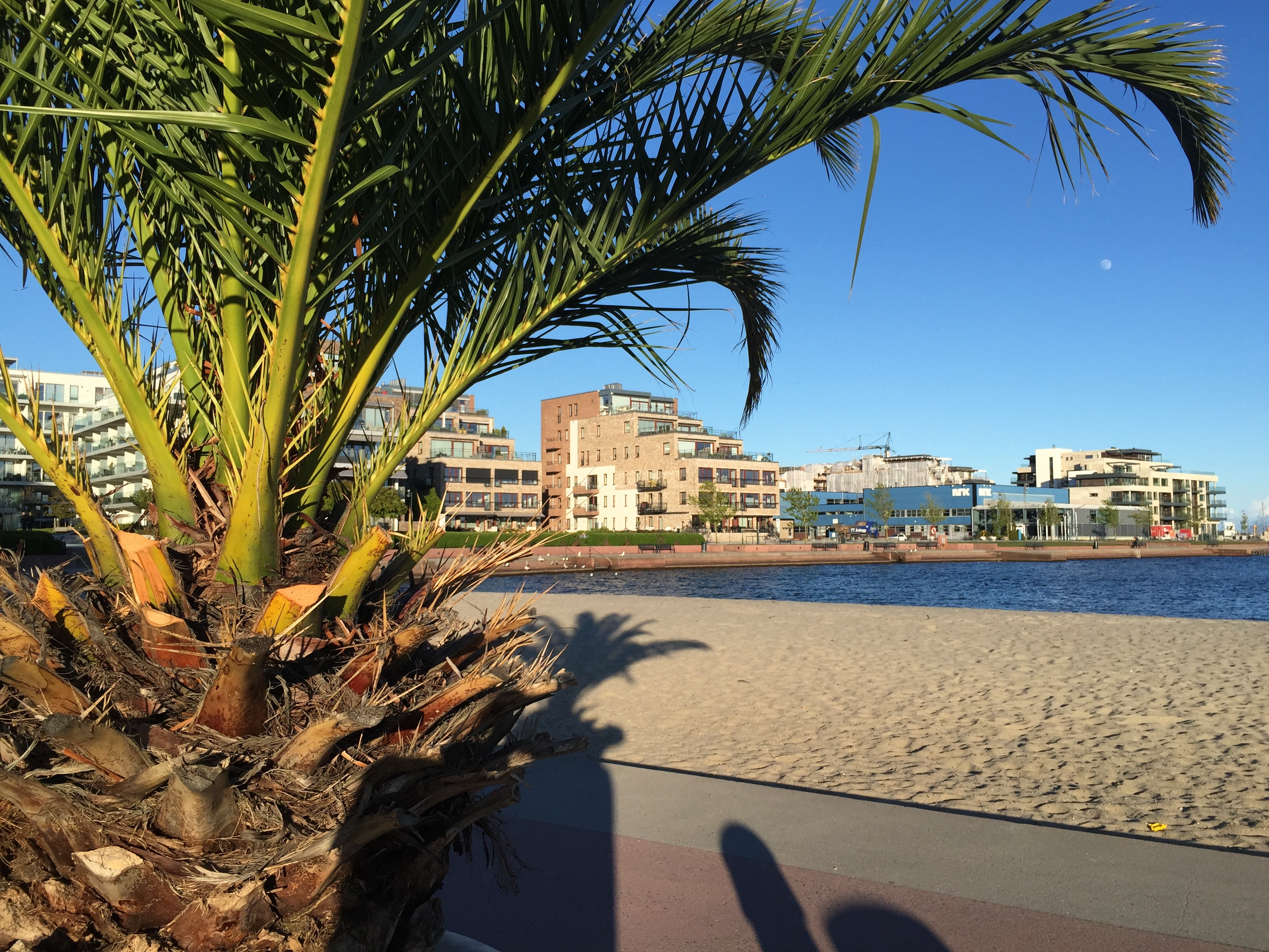 Bystranda